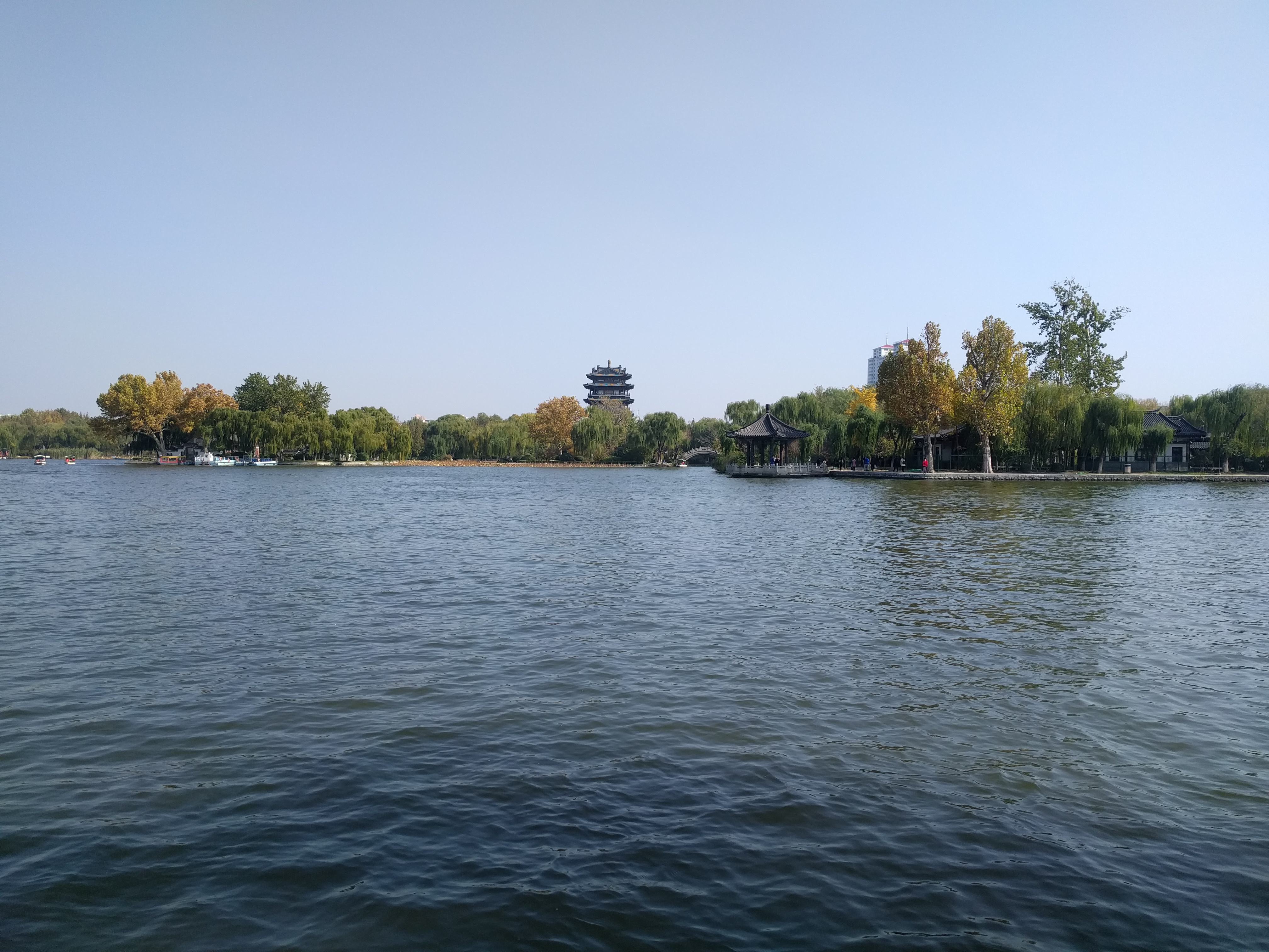 济南大明湖-1